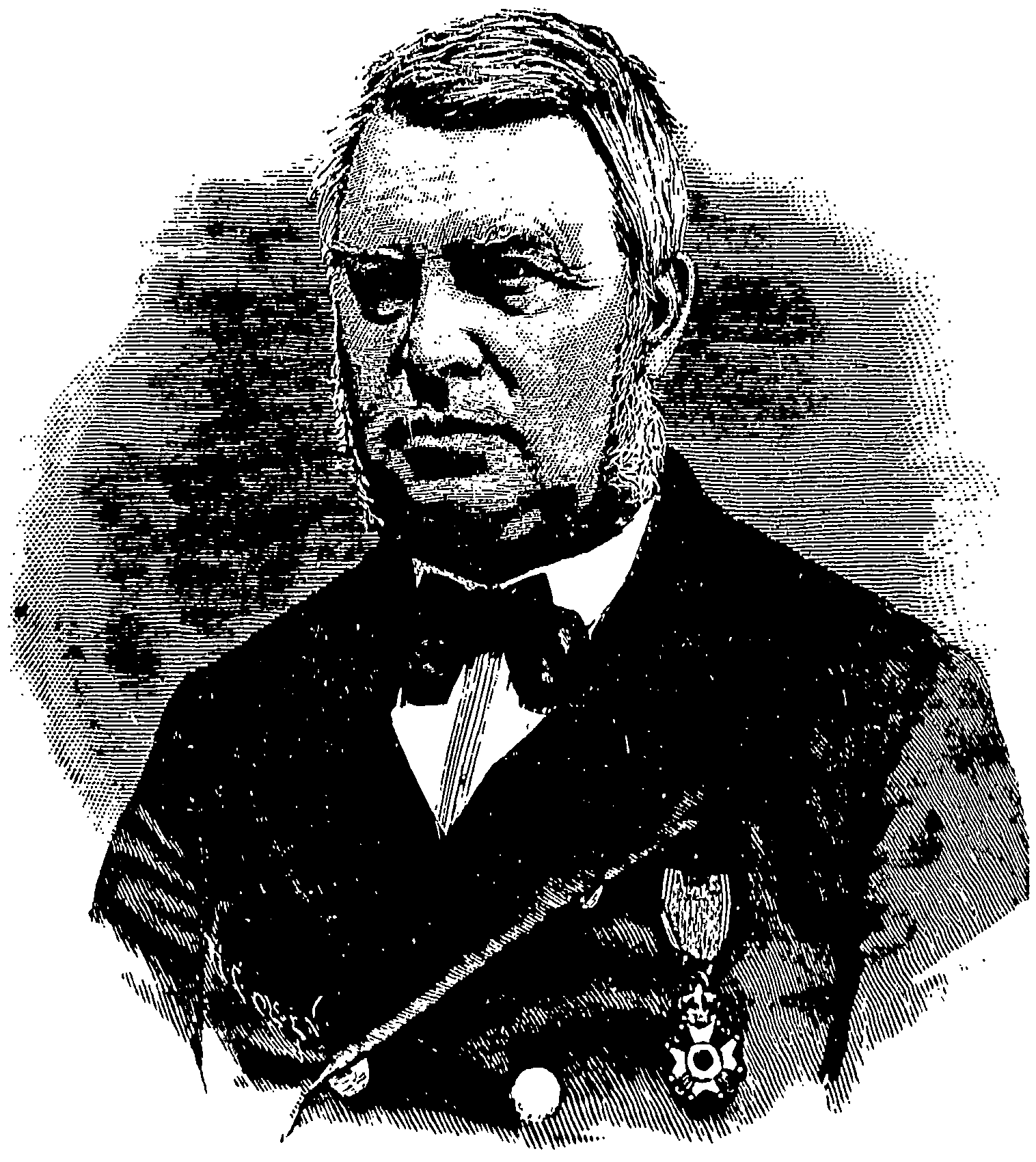 Den norske sjøoffiseren Einar Rosenqvist.